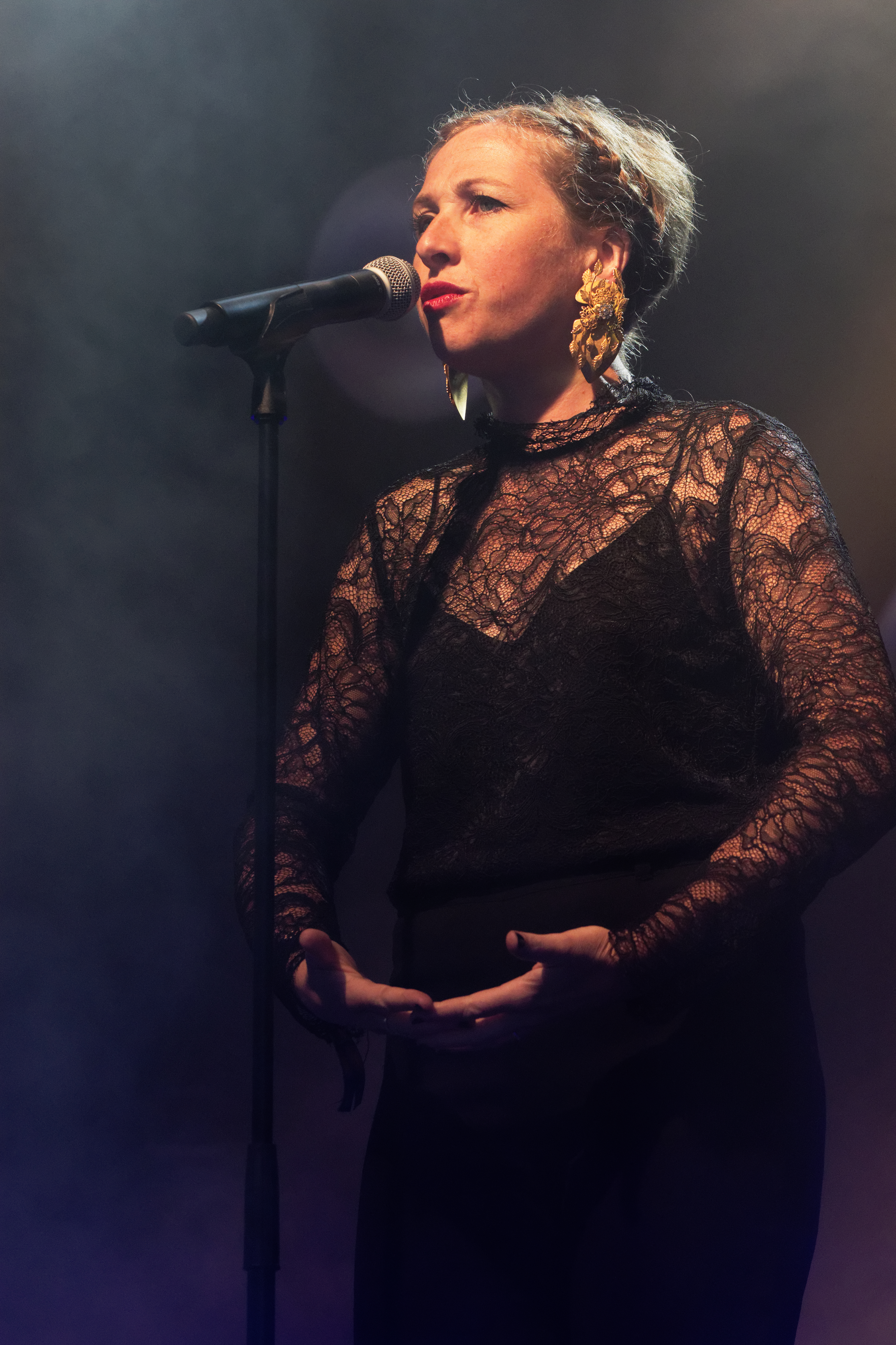 Talec Noguet Quartet en concert lors du festival des vieilles charrues 2019.